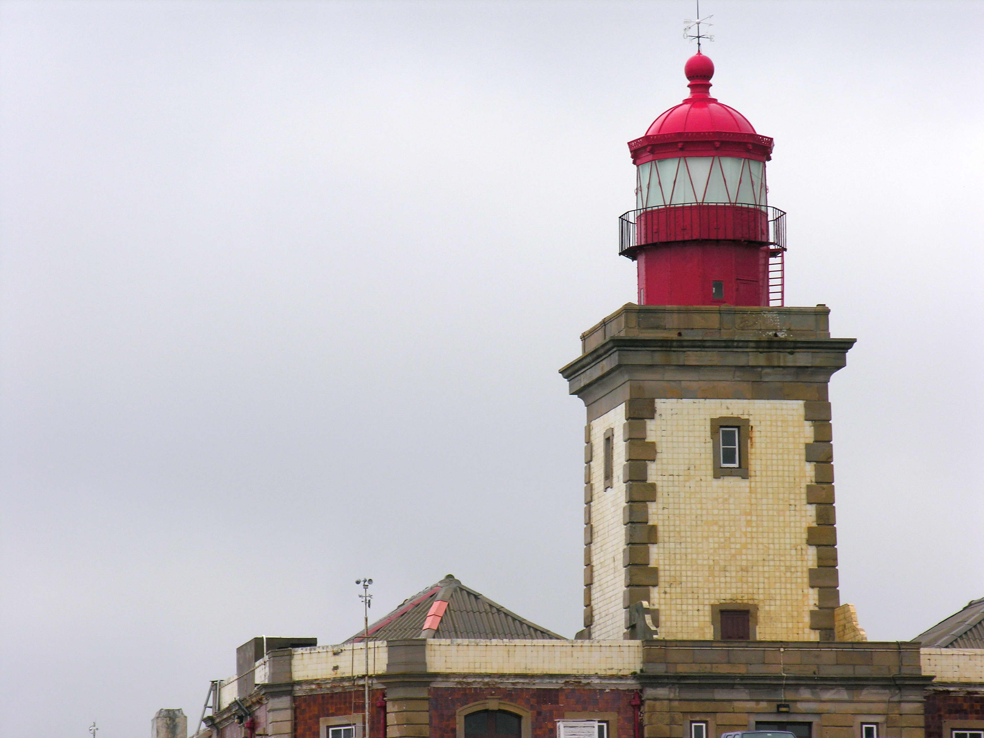 Cabo da Roca, Sintra, Portugal